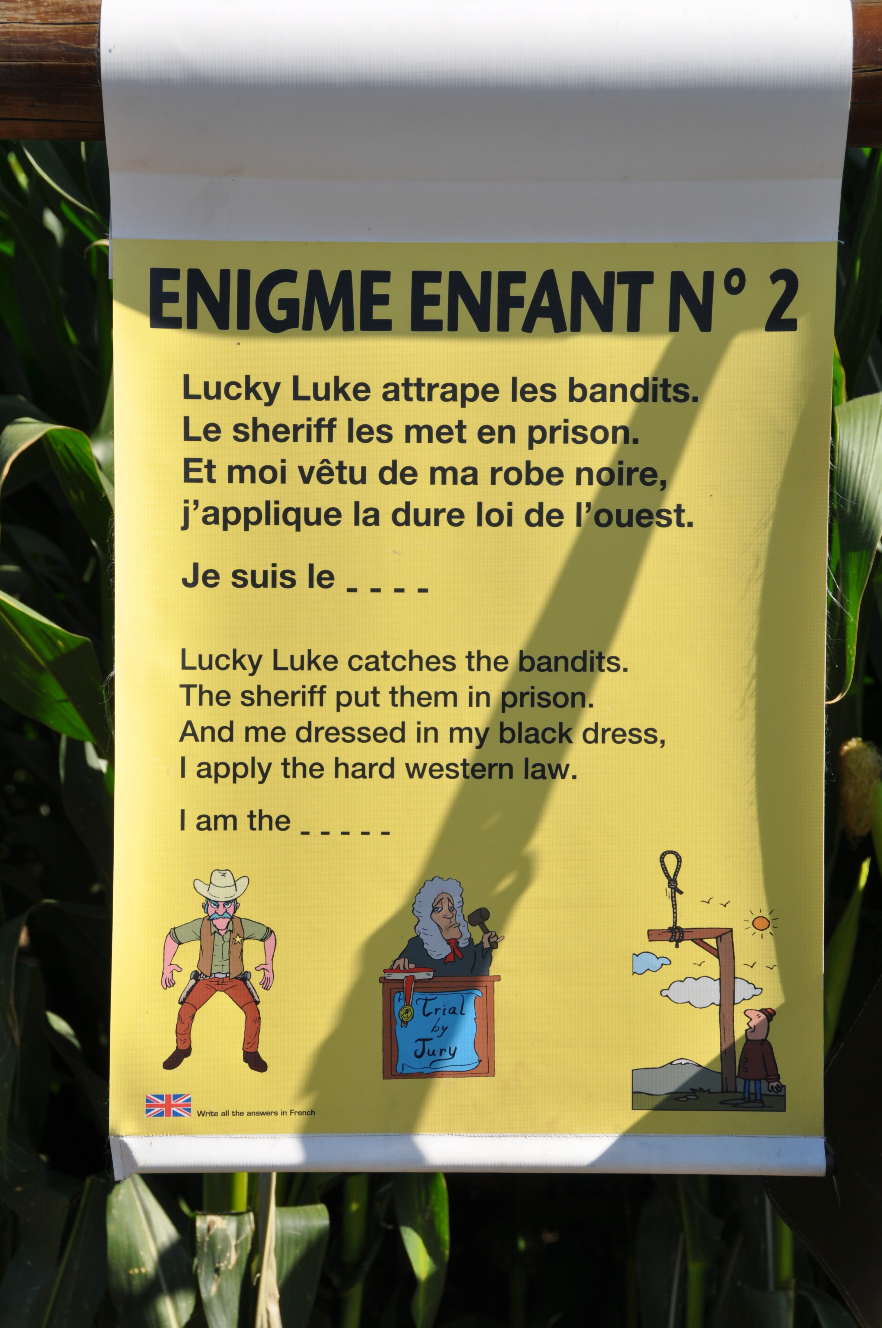 Enigme pour les enfants